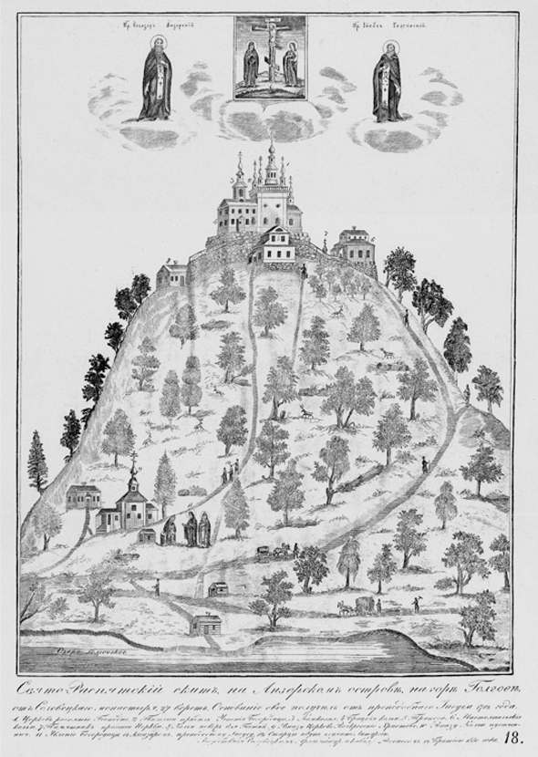 Вид Голгофского скита.